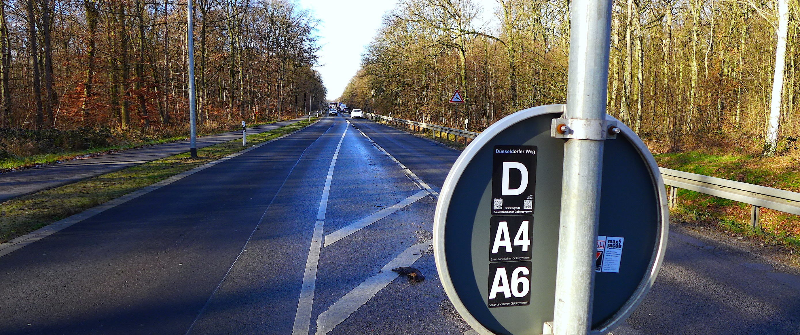 Ам Шёненкамп - улица в Бенрате (Дюссельдорф).